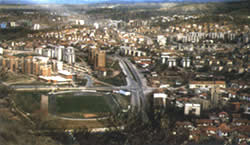 Stip.jpg